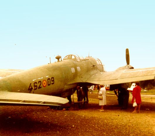 Heinkel He 111 der spanischen Luftstreitkräfte mit Originaltarnlackierung: oliv (oben) blau (unten) (1975). Heinkel He 111, zuletzt im Dienst der spanischen Luftstreitkräfte, mit Original-Tarnlackierung, auf einer Luftfahrtschau auf dem Flughafen Köln-Bonn (heute Konrad Adenauer) im Jahre 1975.